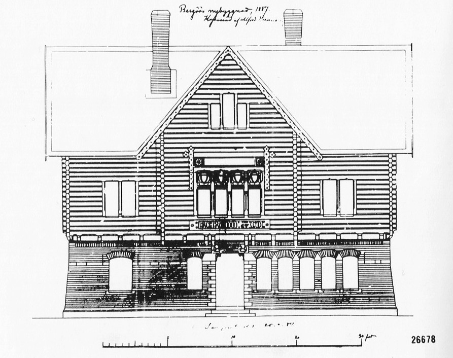 Fasadritning till Bergööska huset